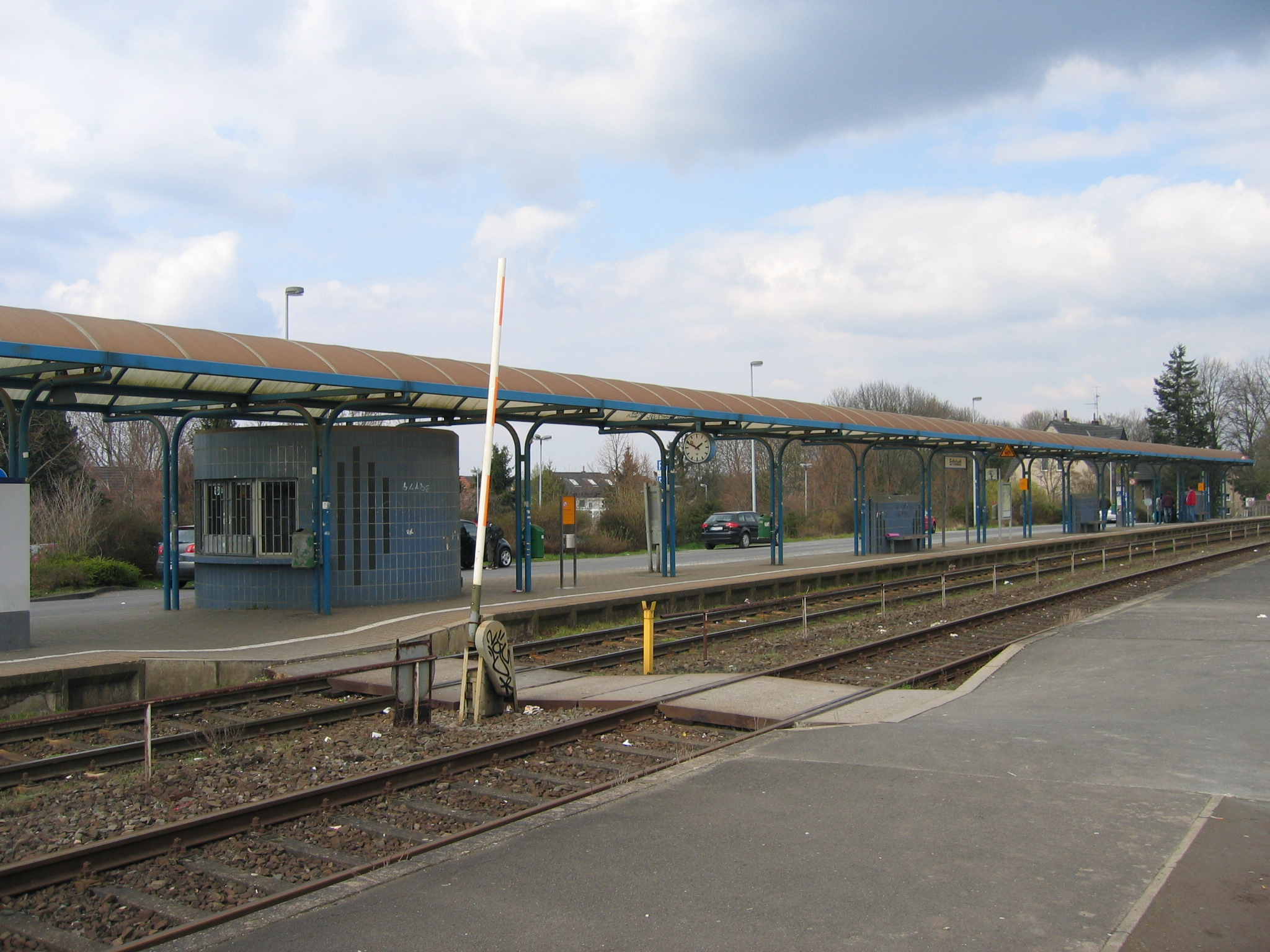 Bahnhof Erftstadt